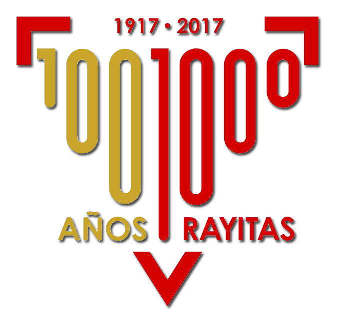 Logo "Rumbo al Centenario " Del Club por la llegada de sus 100 años